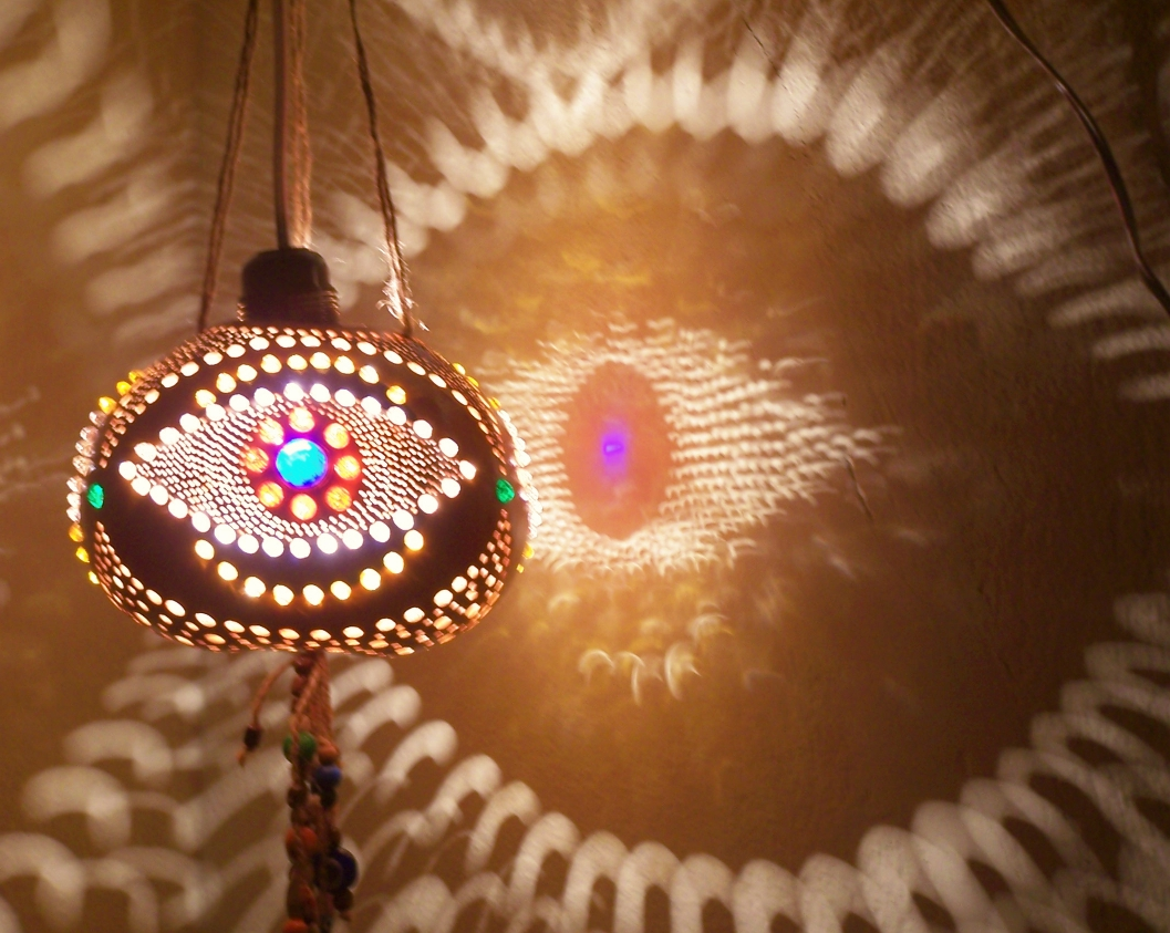 NAZAR LAMBASI: Su kabağının içi oyularak boşaltılır. Üzerine göz şeklinde nazar boncuğu resmi çizilerek boyanır. Delikler delinerek dışarı ışık çıkması sağlanır. Su kabağı lambaları sitesi